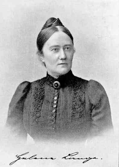 Helene Lange (1848–1930) Photographie Atelier Elvira, Hofphotographische Anstalt München vor 1899